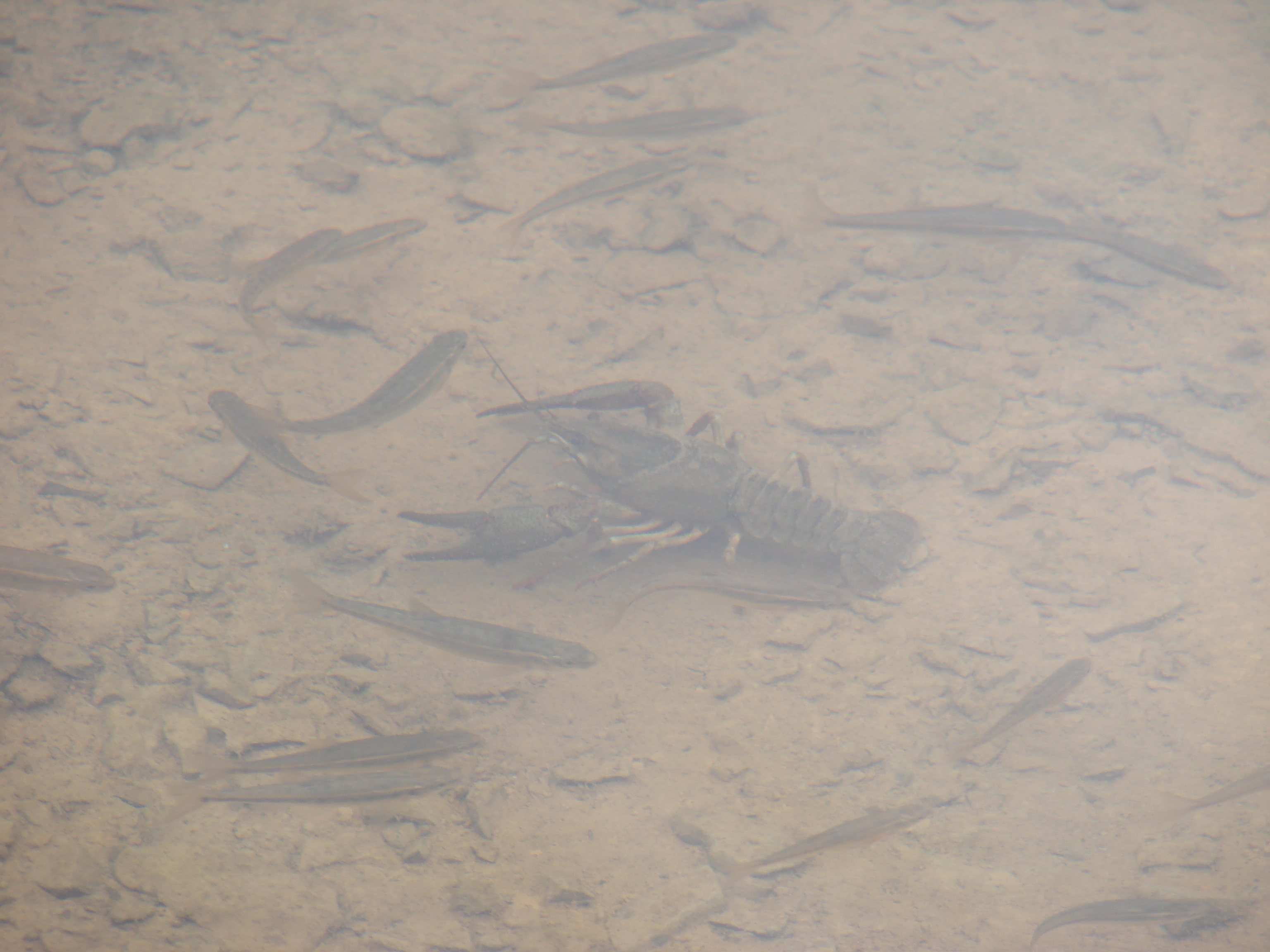 оз. Синевир